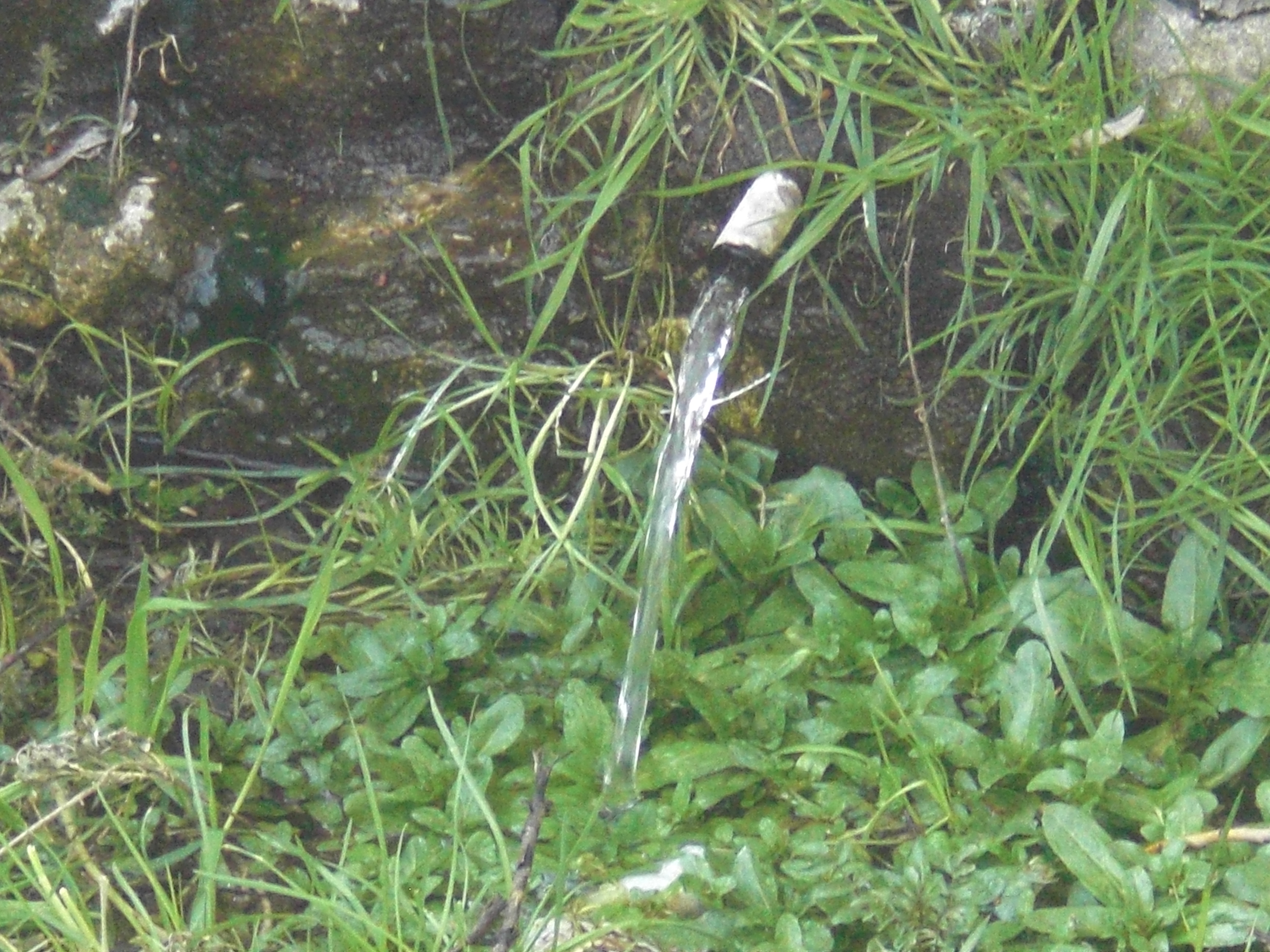 Manantial "El caño", una de las fuentes que hay en Marugán.